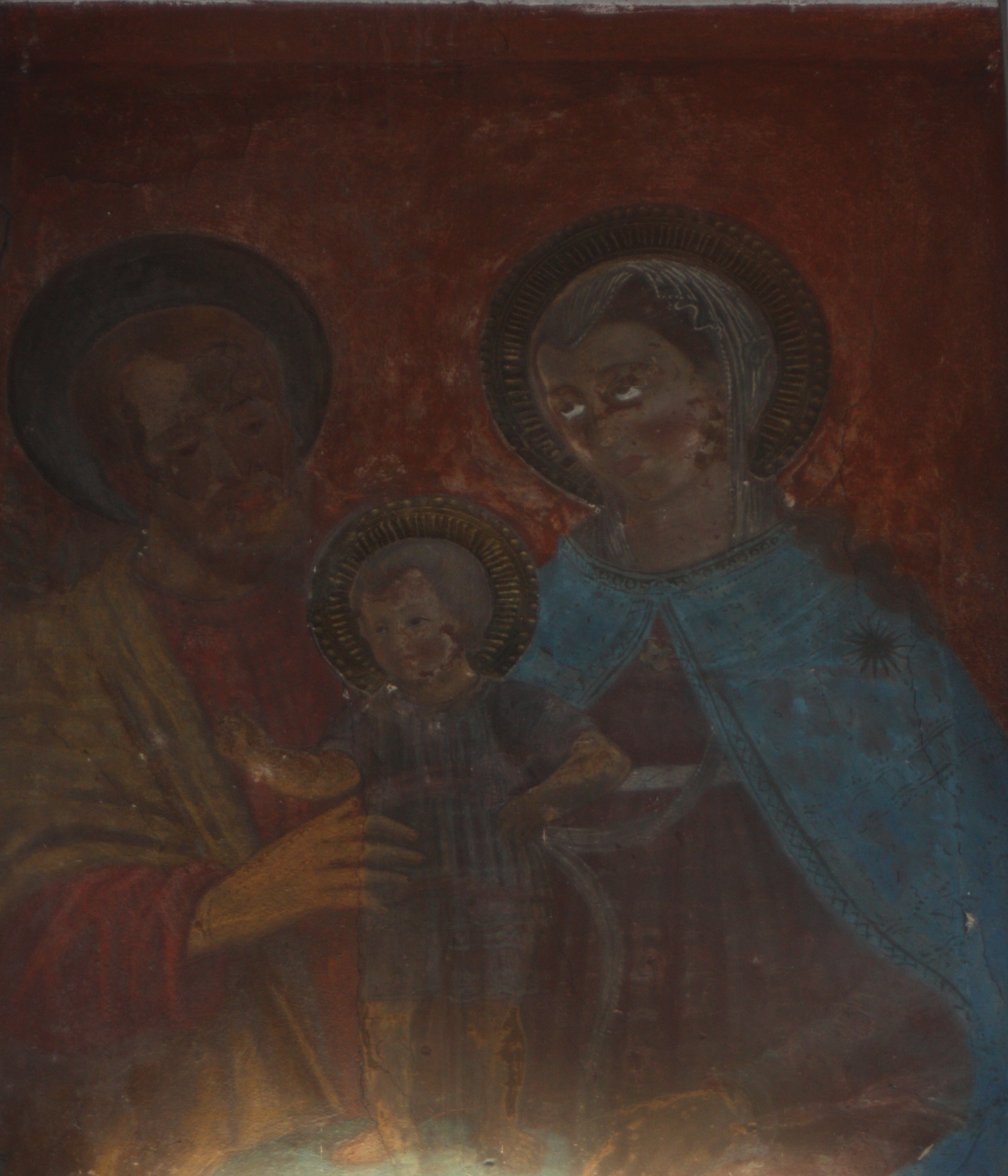 Affresco della Madonna del Soccorso della Chiesa di San Quirico a Legnaia, nel quale è presente la Sacra Famiglia